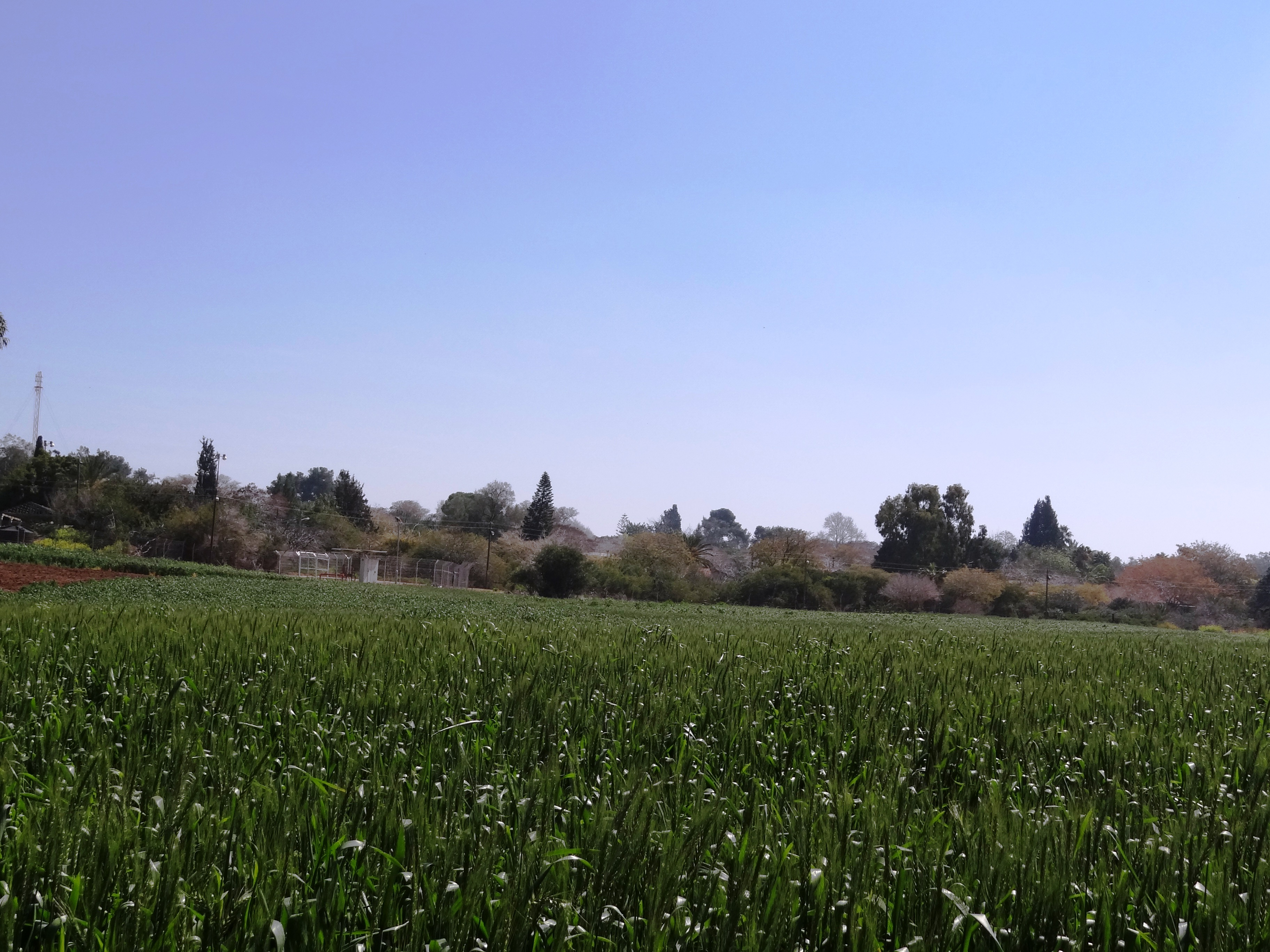 Gvar'am is a kibbutz in southern Israel גברעם הוא קיבוץ (הקיבוץ המאוחד) במישור החוף הדרומי ובמבואת הנגב. גברעם מבט כללי